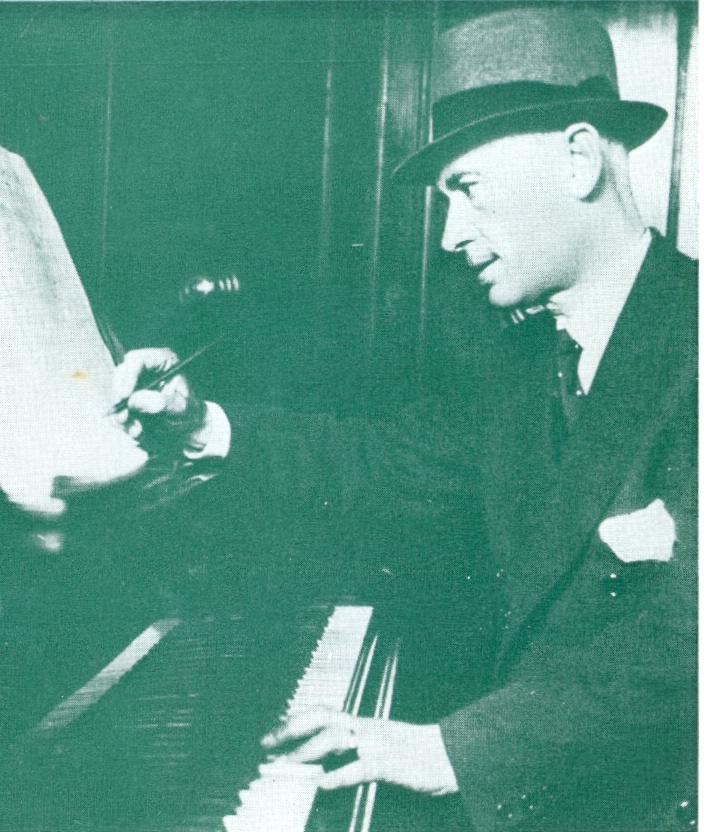 Foto di Augusto Massari